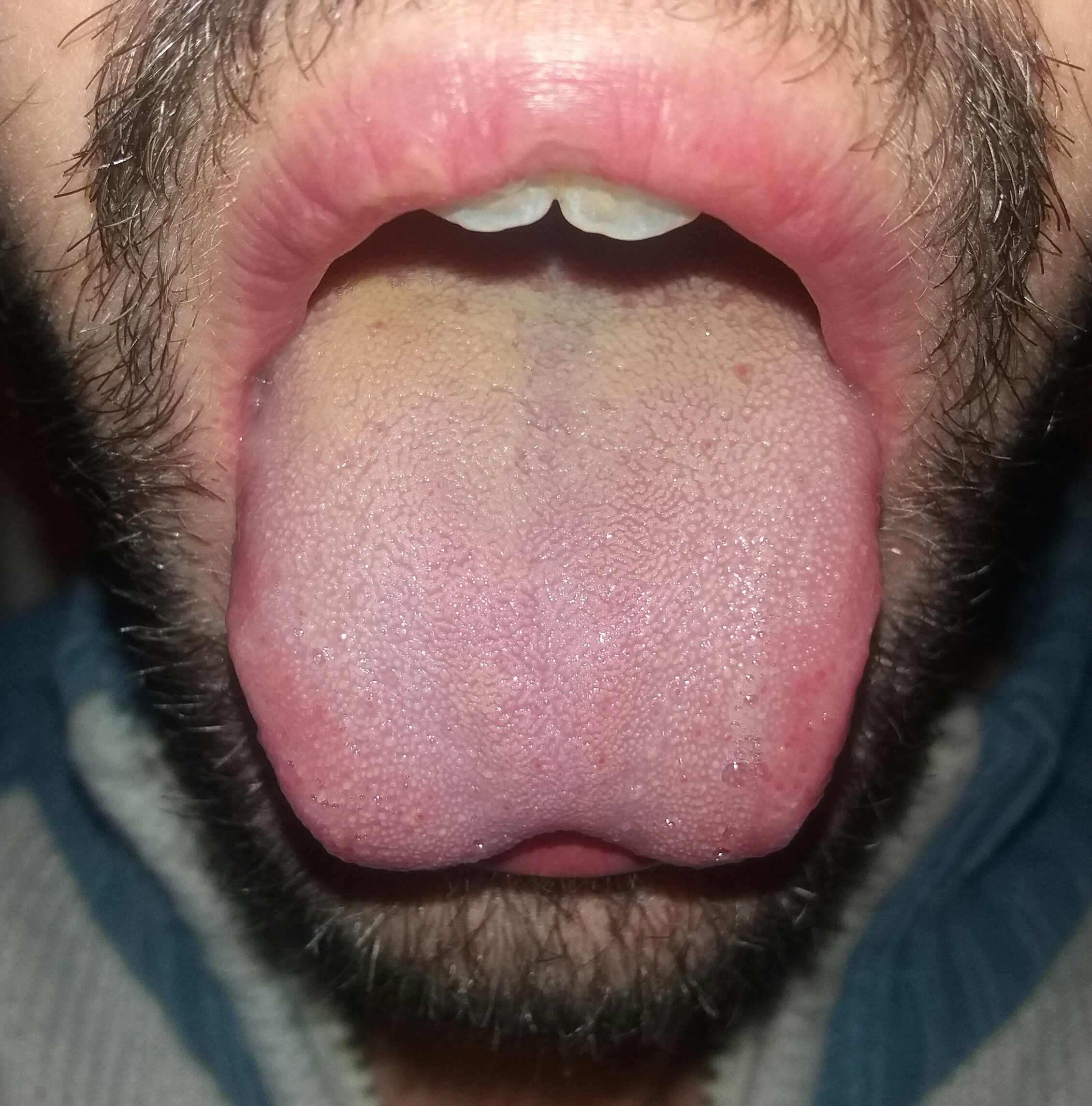 Langue courte d'un homme qui souffre de frein lingual